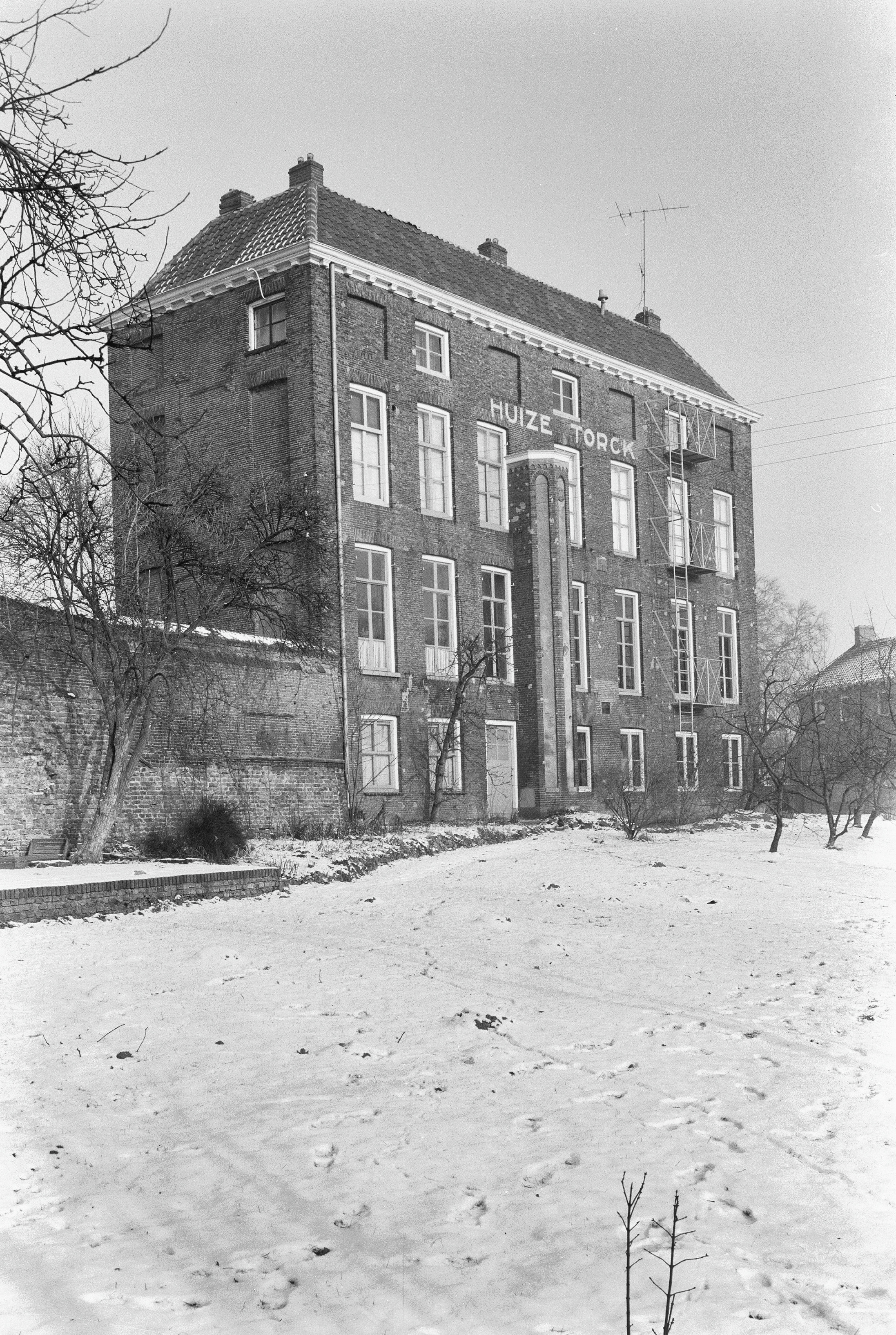 Huize Torck, voorgevel